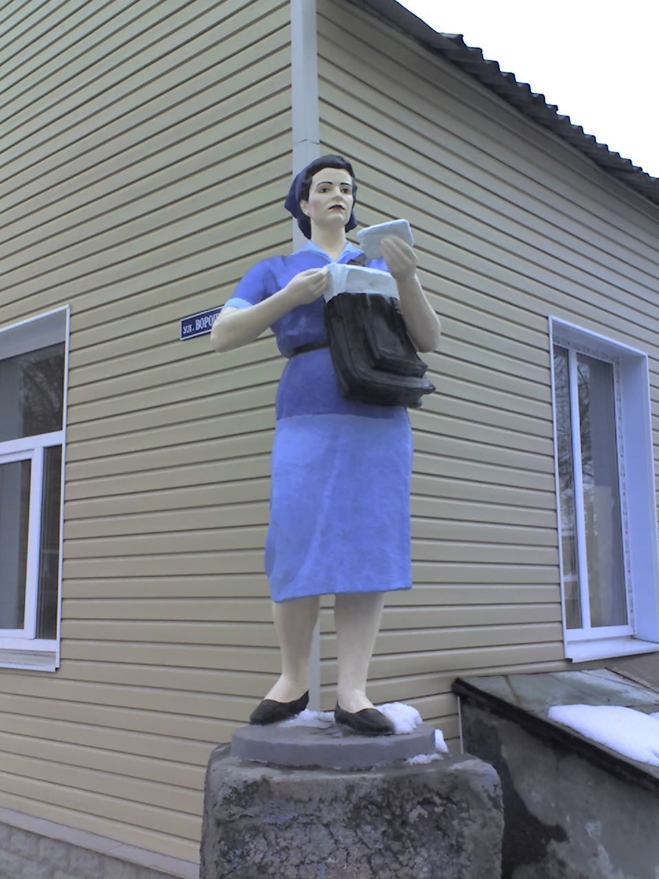 Памятник – женщина с почтальонской сумкой. Одета она просто, взгляд её точен, выглядит она решительно. Из сумки видны письма, на верхнем из которых написано: «Письмо с фронта». Восстановлен несколько лет назад.